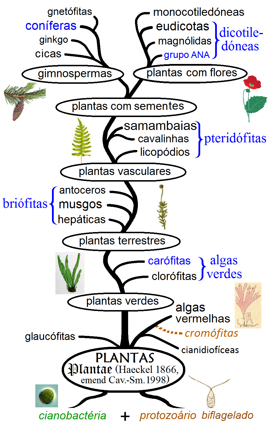 Filogenia das plantas. mostrando os clados principais e grupos tradicionais. Grupos monofiléticos estão em letras pretas e parafiléticos em azul.